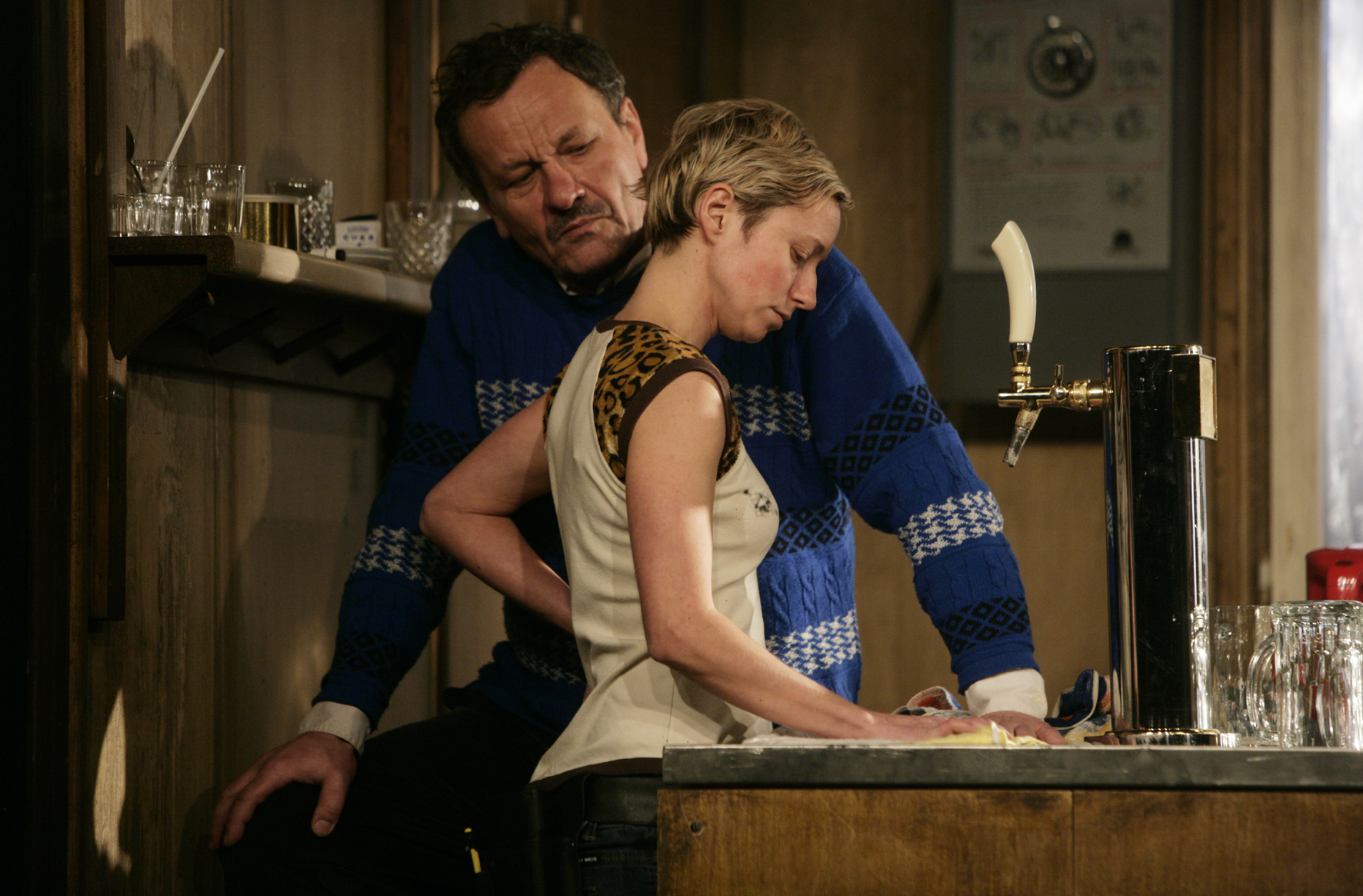 Irvine Welsh: Ucpanej systém, představení v Dejvickém divadle, Miroslav Krobot, Jana Holcová.